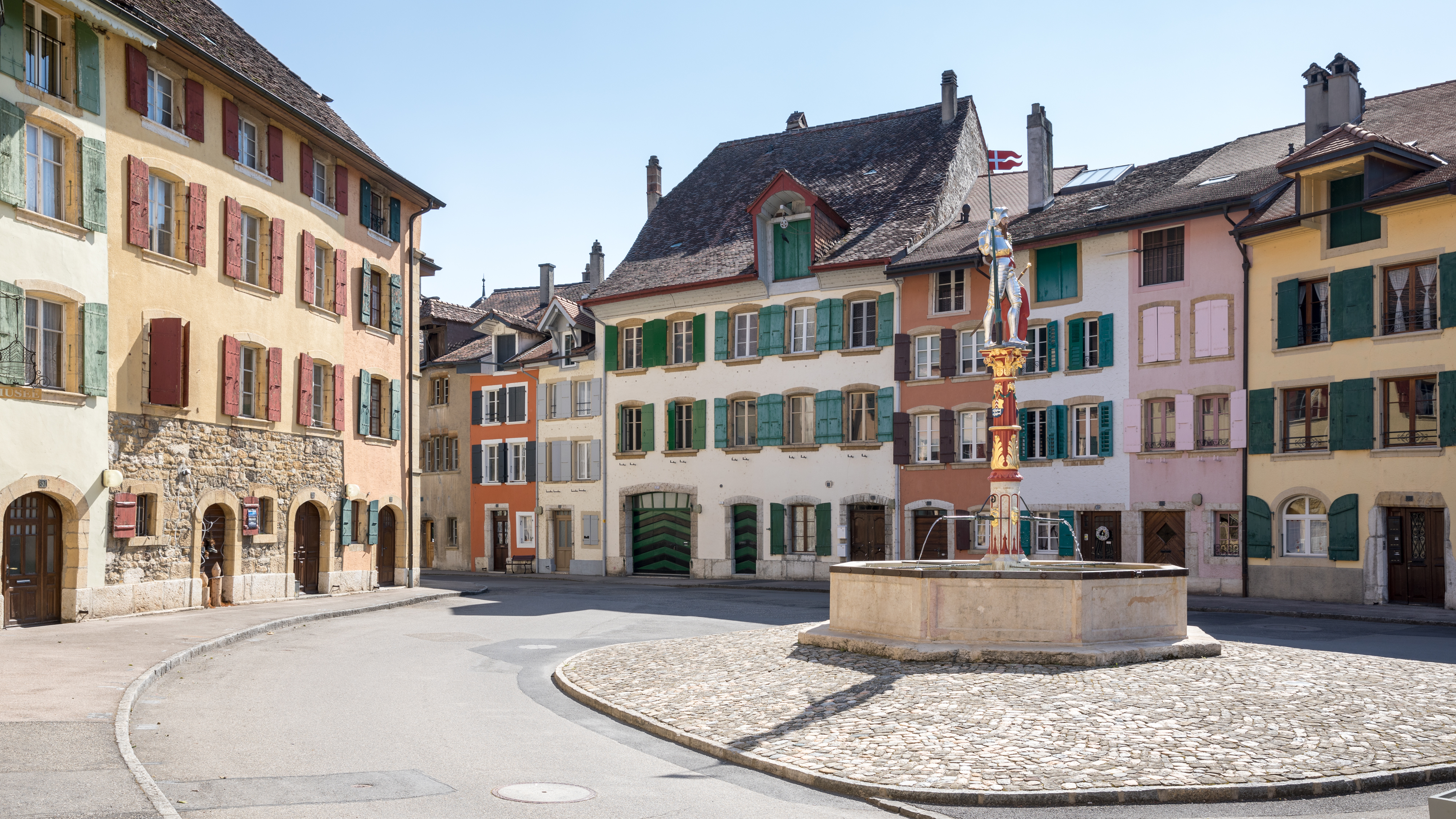 Le Landeron: südl. Teil der Altstadt mit St. Mauritius-Brunnen